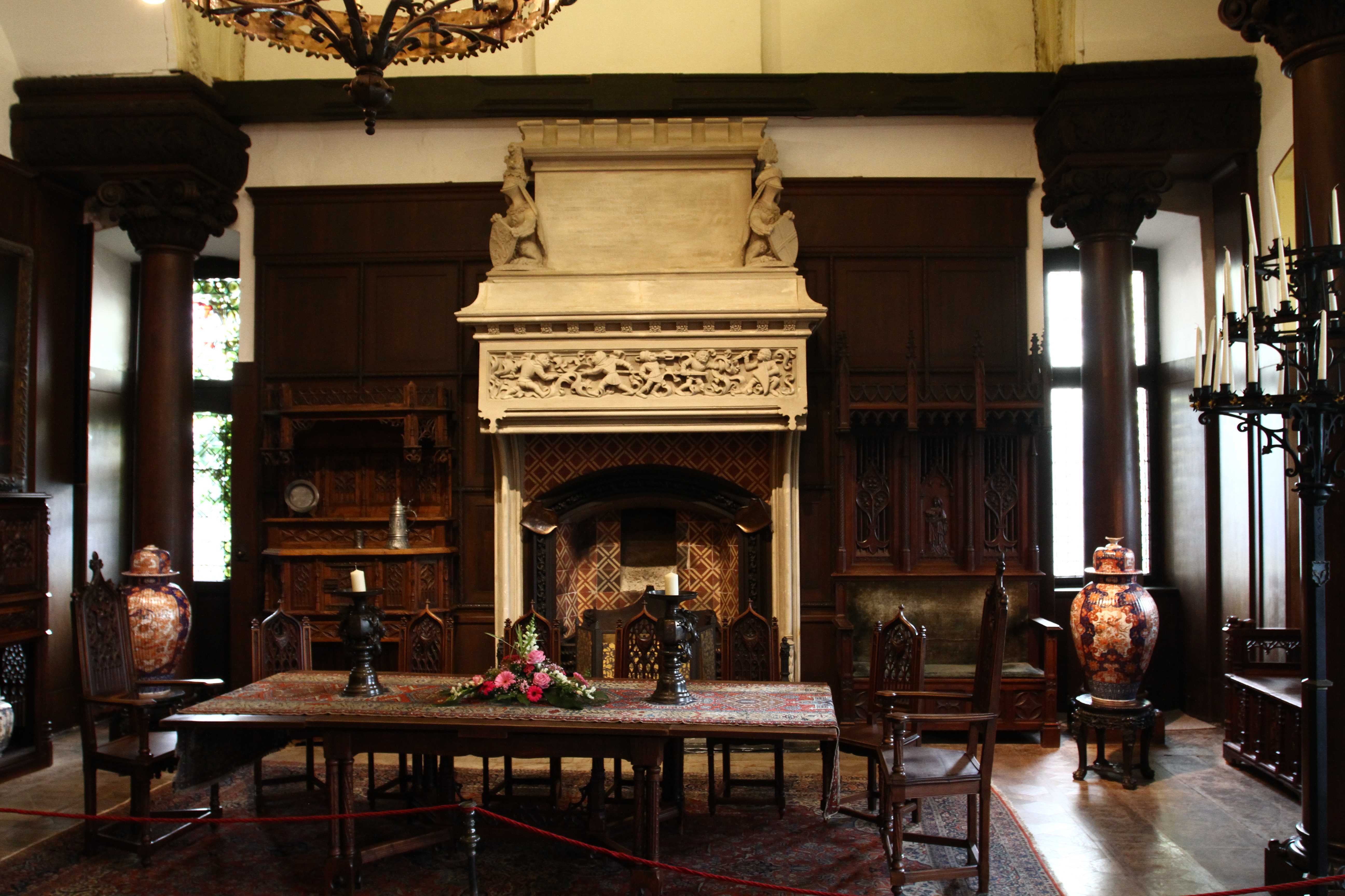 Рыцарский зал, замок Райхсбург